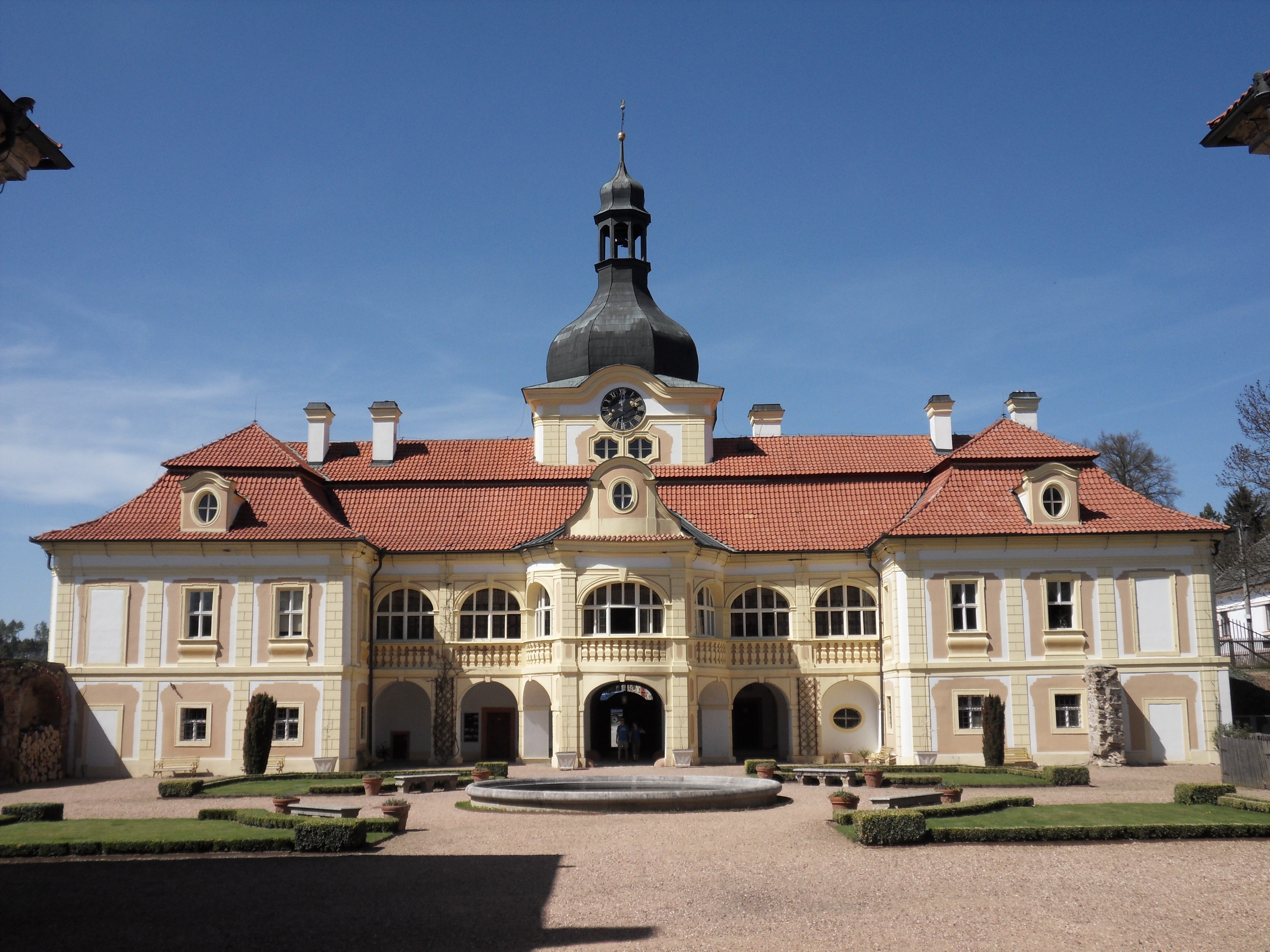 Zámek Nebílovy, pohled z nádvoří na severozápadní část